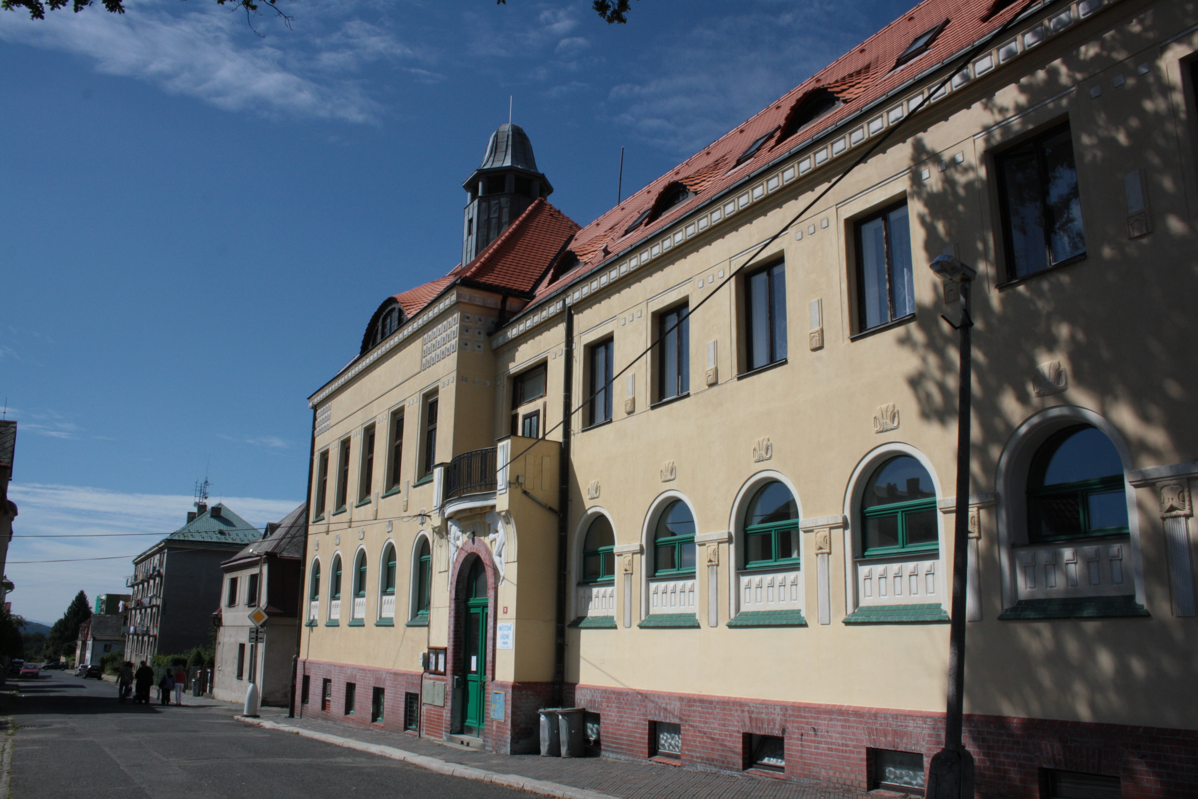 Jihovýchodní průčelí (do Ludvíkovské ulice) městských lázní v Novém Městě pod Smrkem.